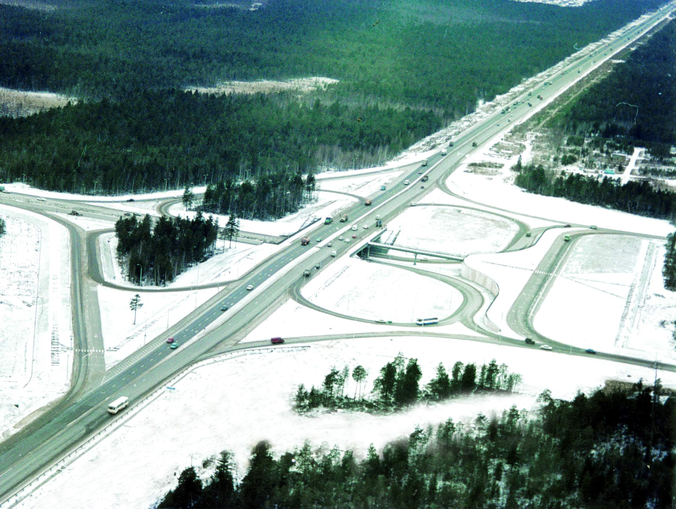 Surgut Interchange